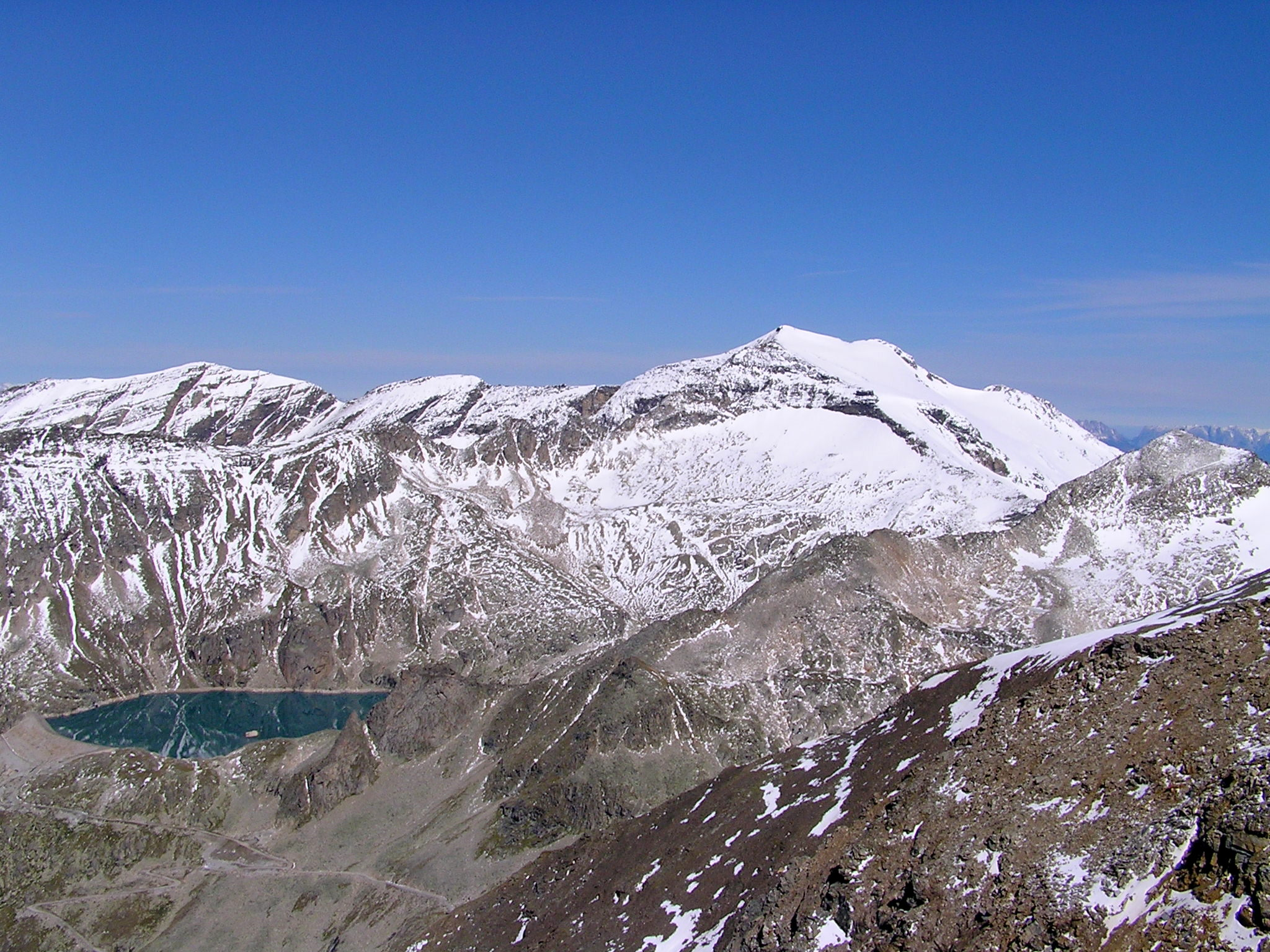 Hocharn (3254m) vom Sandkopf (3090m) aus gesehen, Zirmsee.